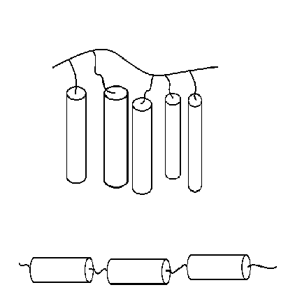 מבנים פולימרים המתאימים ליצירת גביש נוזלי